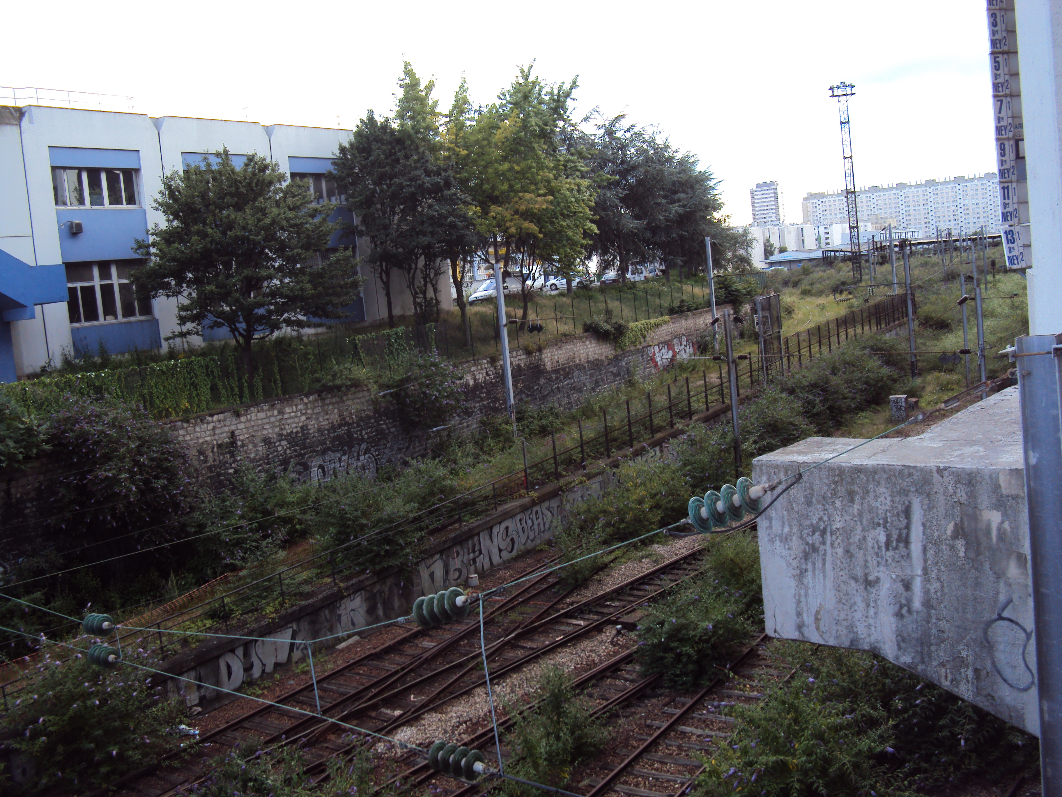 Petite ceinture de Paris - entre porte d'Aubervilliers et porte de la Chapelle